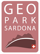 Logo des Vereins Geopark Sardona, Engi GL, Schweiz